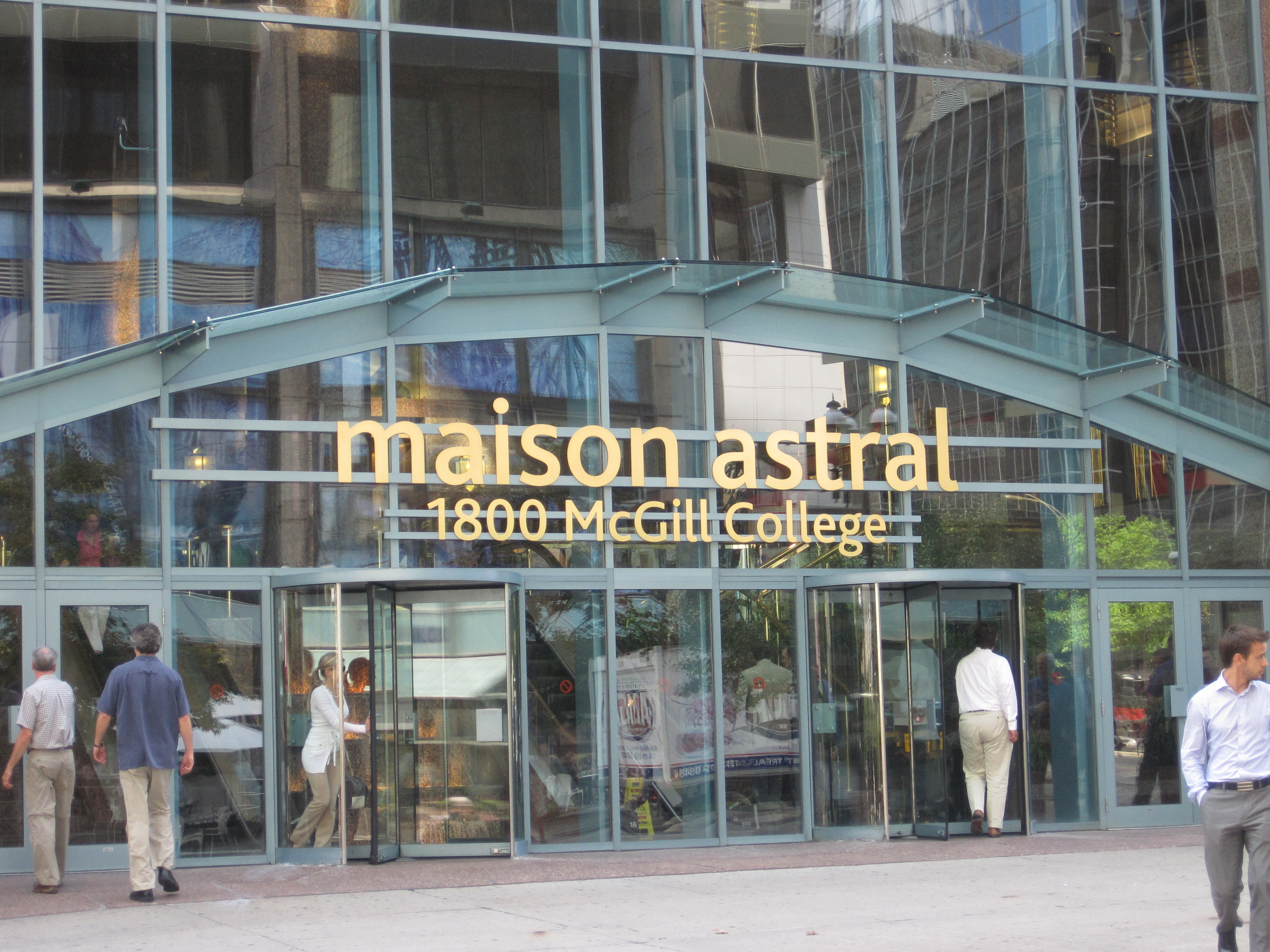 Entrée principale de la Maison Astral (Avenue McGill College à Mtl)